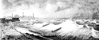 Artwork by Ukrainian artist Opanas Slastion. "Синє море гра. Козацькі чайки під Константинополем"